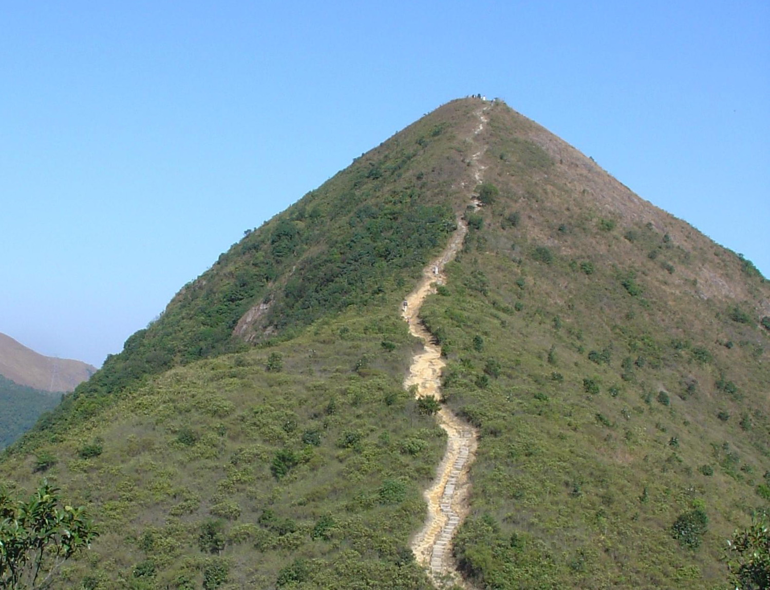 針山 Summit of Needle Hill, along stage 7 of the MacLehose Trail